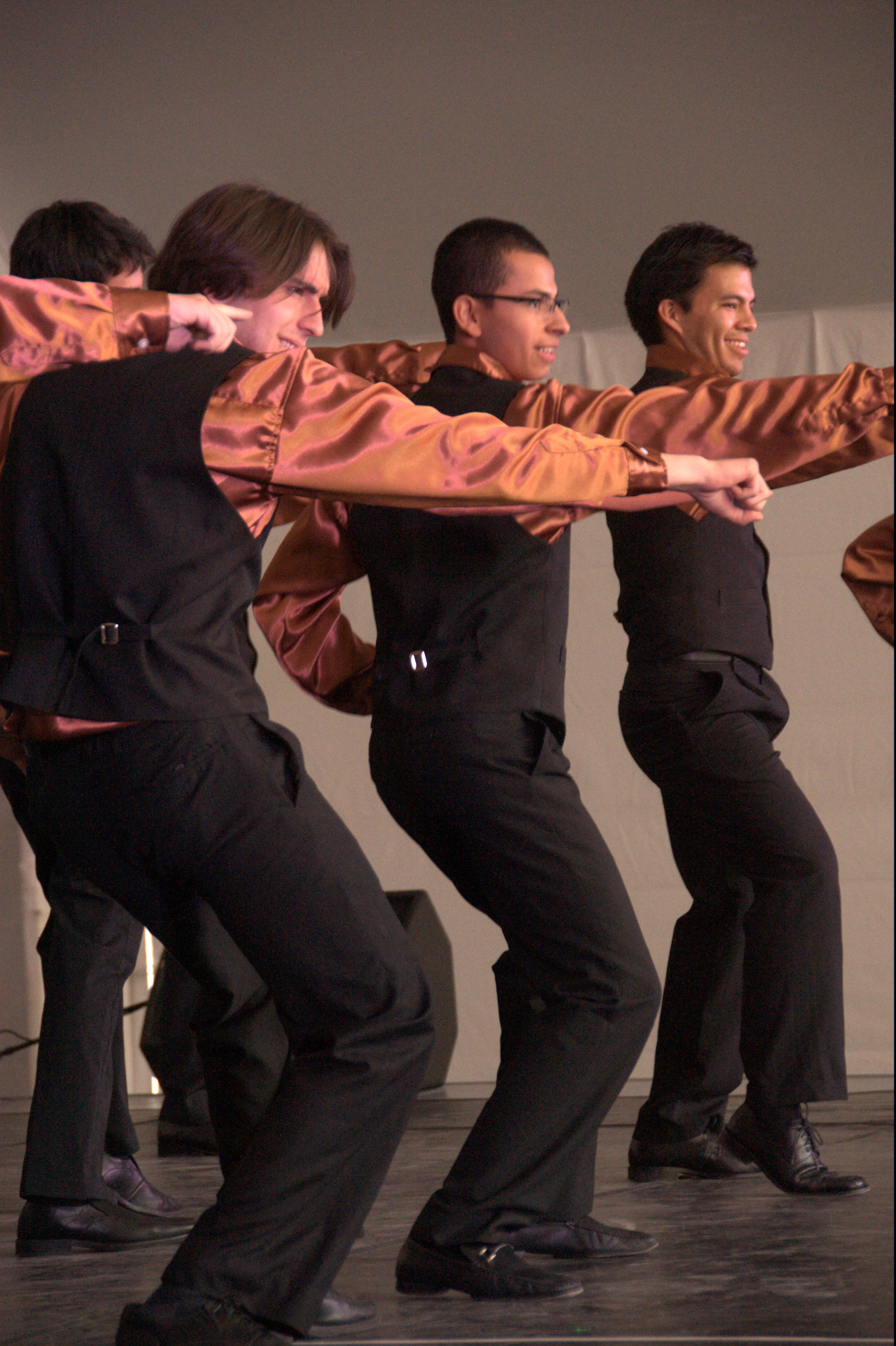 Baile disco durante el evento Semana de la Cultura en ITESM Campus Ciudad de México